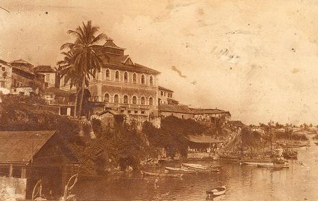 Mombasa, Kenya